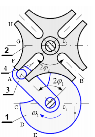 Nguyên lý hoạt động